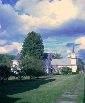 Sylvania, Pennsylvania